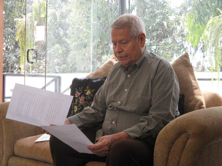 Luis Valdez Villacorta es un empresario Amazónico contituyendo varias exitosas empresas e incursionando en la Política logrando ser elegido como alcalde de la Provincia de Coronel Portillo de Ucayali de una manera exitosa y sin precedentes.